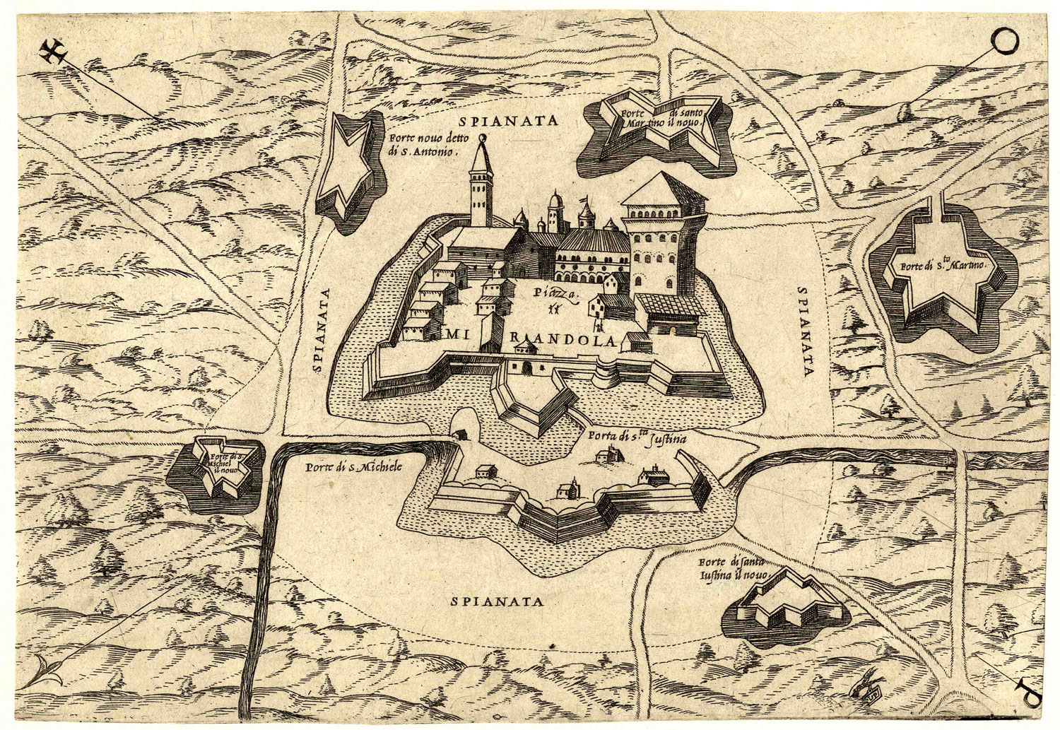 Mirandola (Stadt und Umgebung); Kupferstich, um 1550